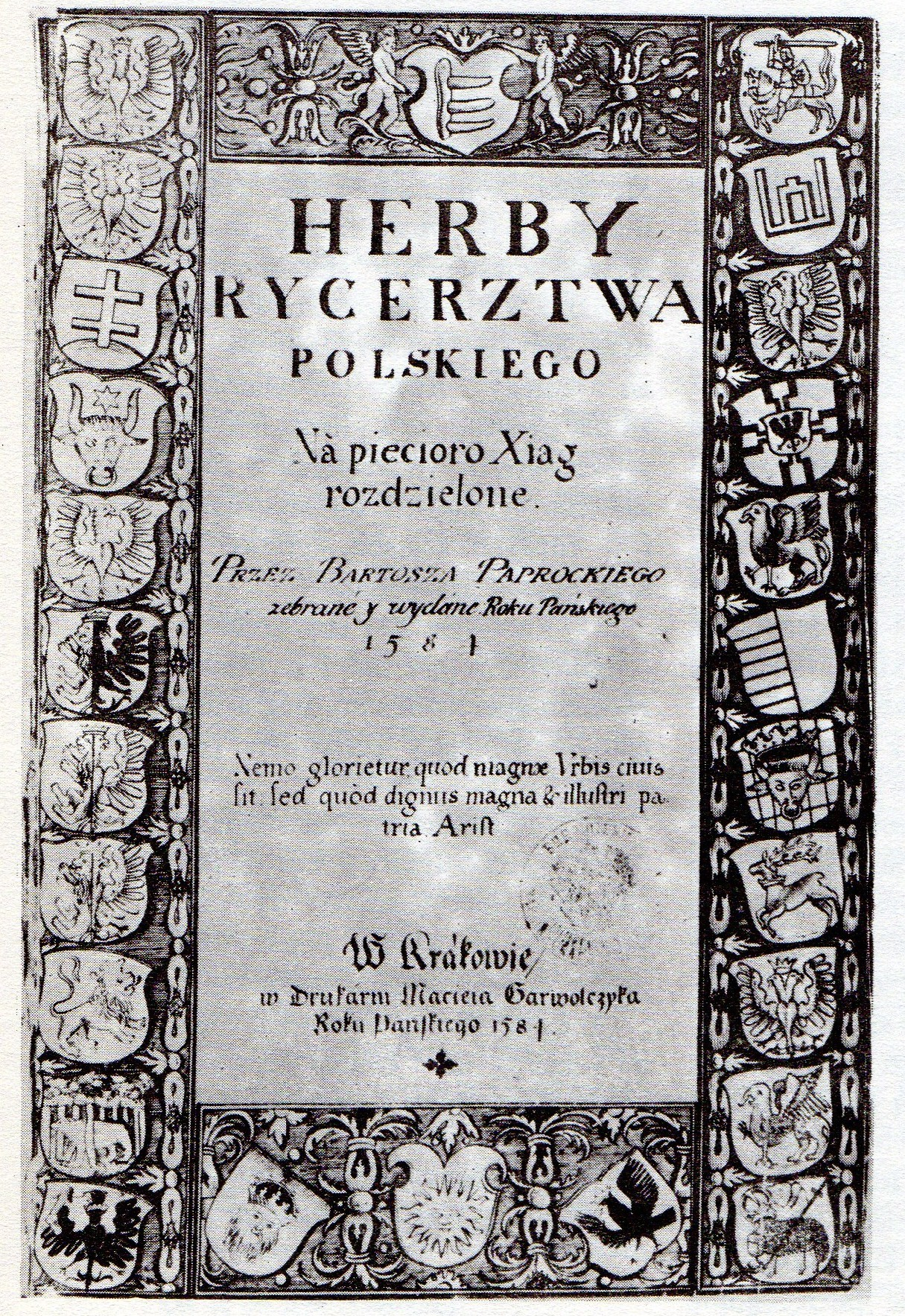 Herby rycerstwa polskiego - Bartosz Paprocki (1584r.).